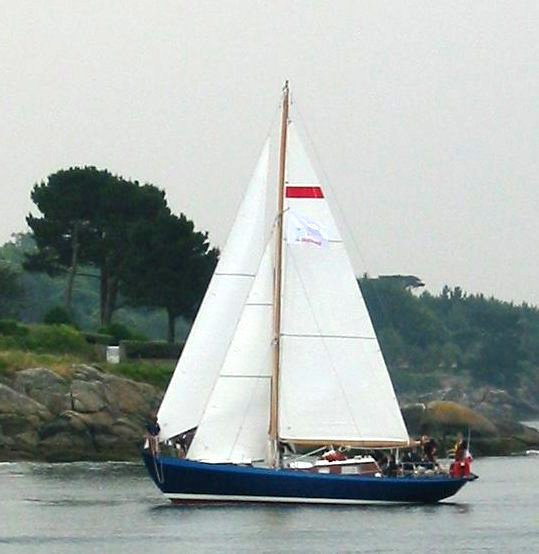 Sereine, le jour de sa ré-inauguration